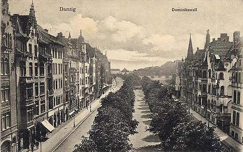 Ulica Wały Jagiellońskie w Gdańsku - część południowa.